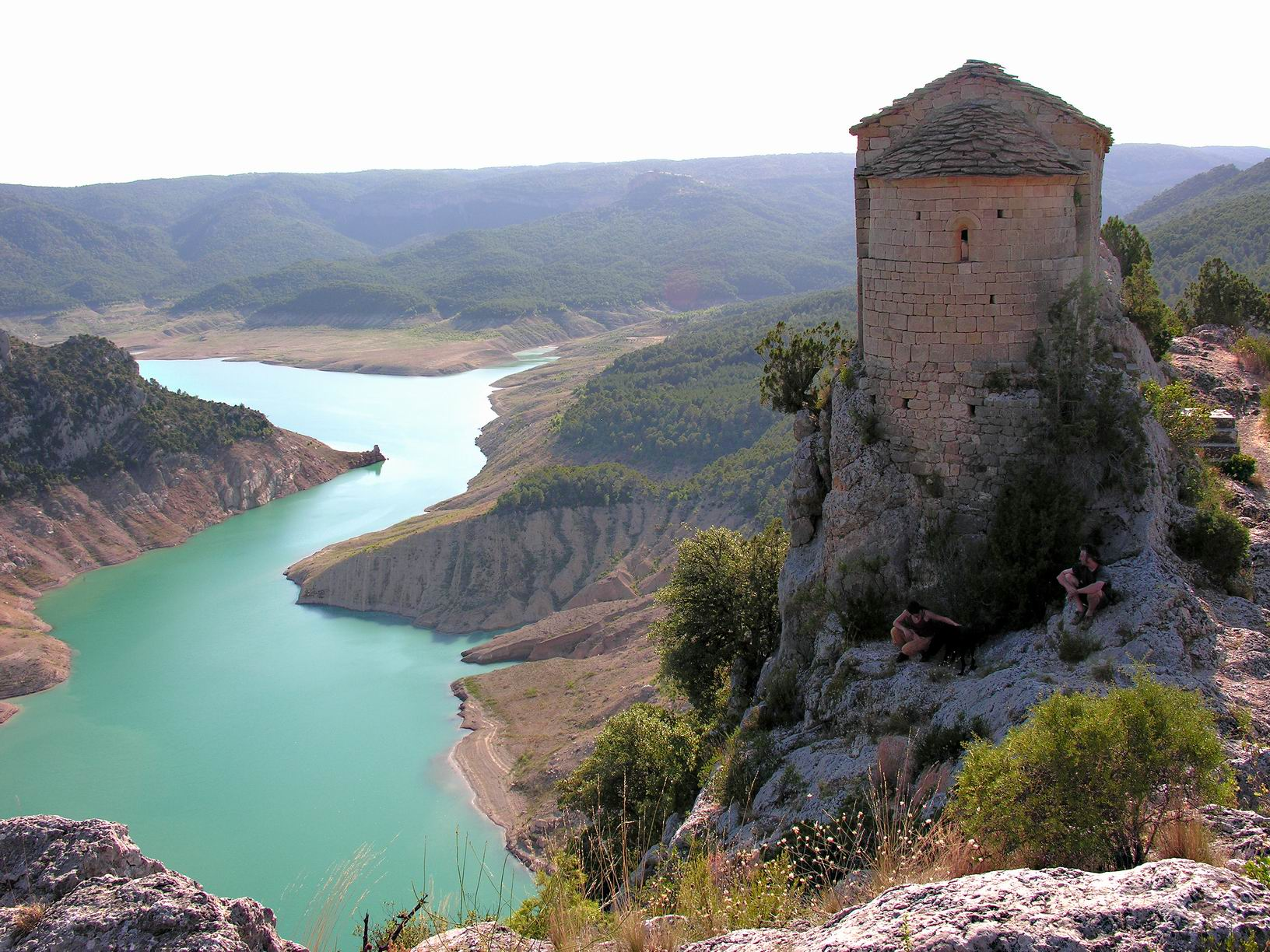 Mare de Déu de la Pertusa, a Corçà (Àger), La Noguera, Catalunya.